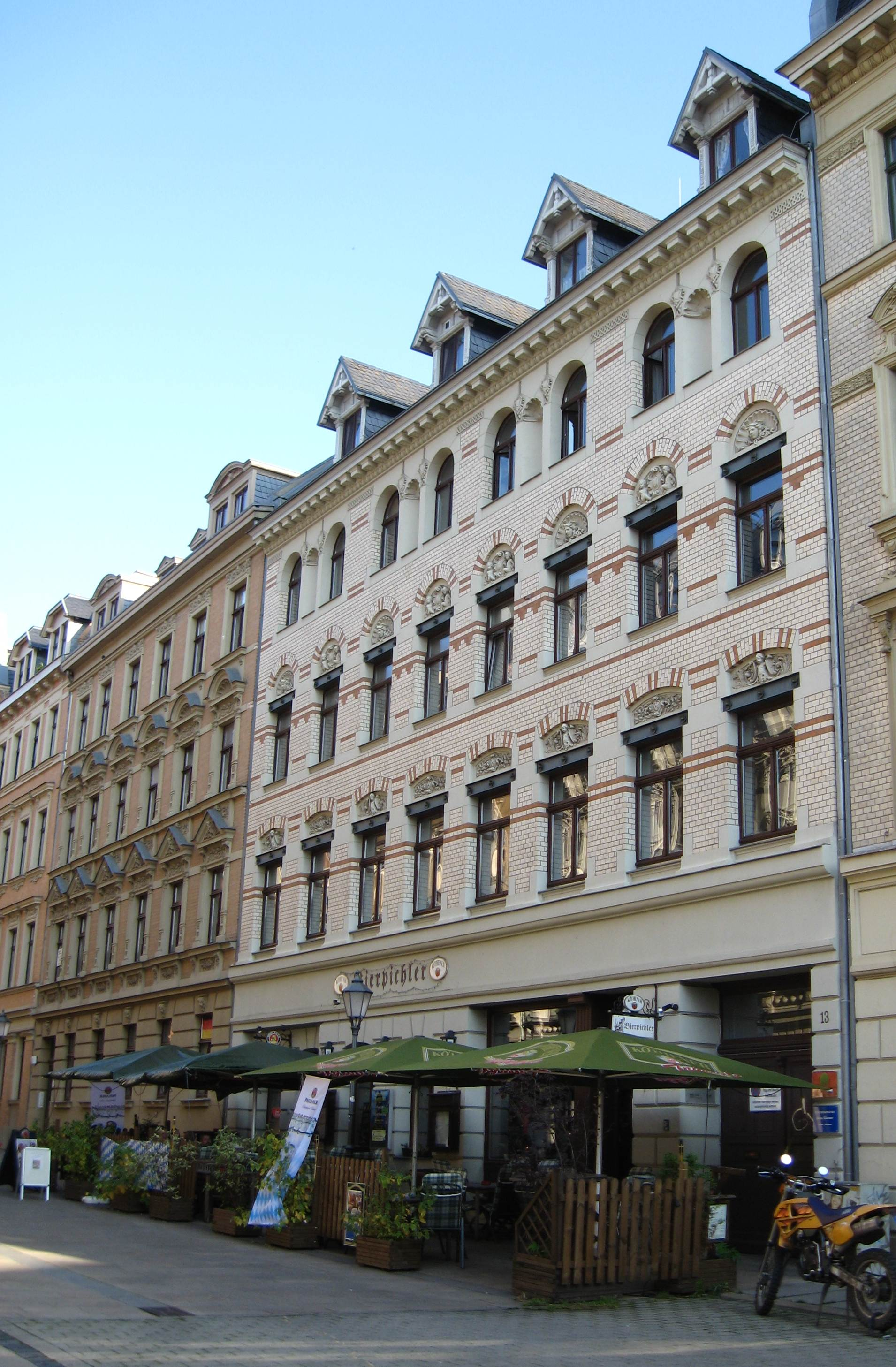 Die Sternstraße 13 in Halle (Saale) .